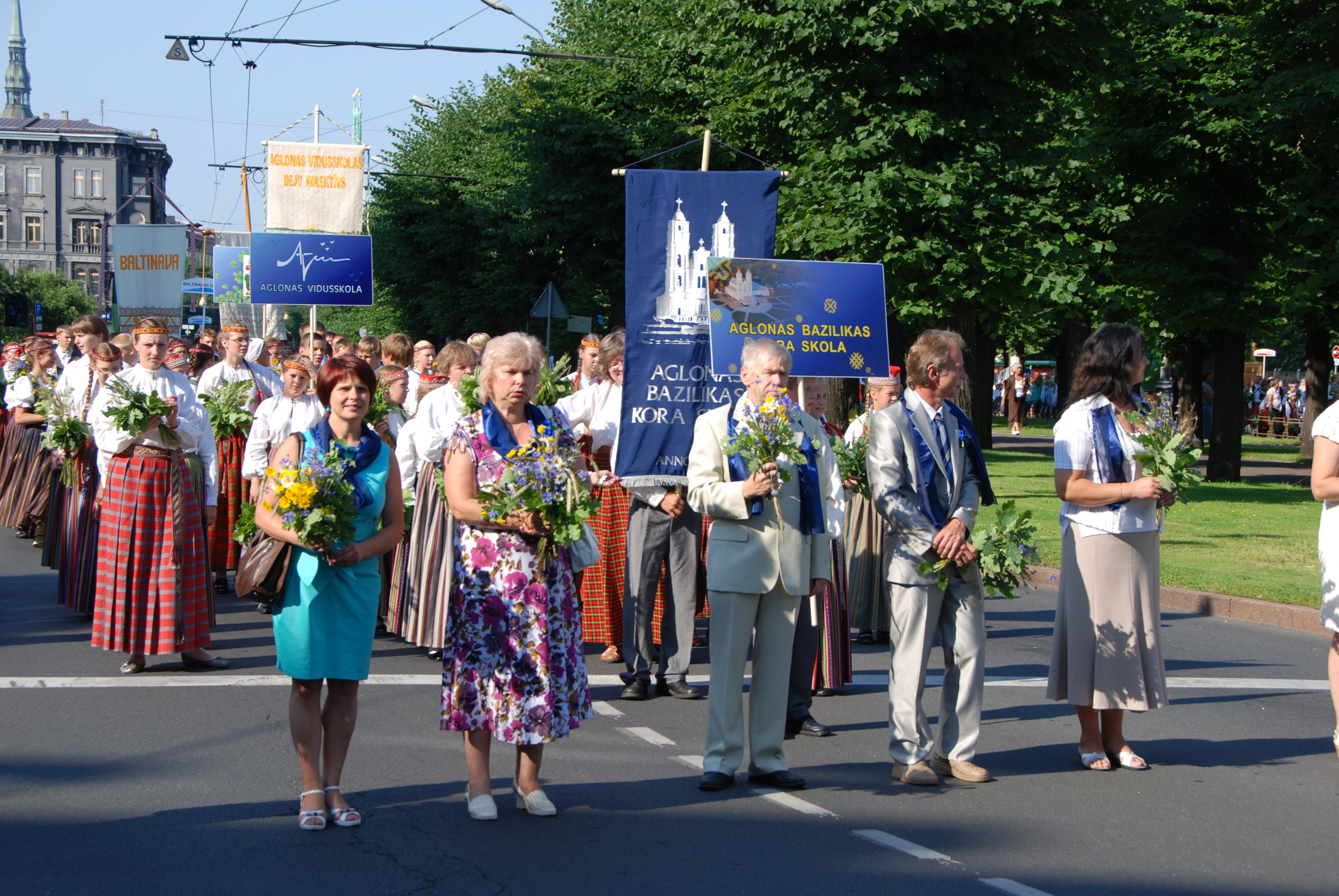 X Latvijas skolu jaunatnes dziesmu un deju svētku gājiens, Rīga, 2010.gada 10.jūlijs